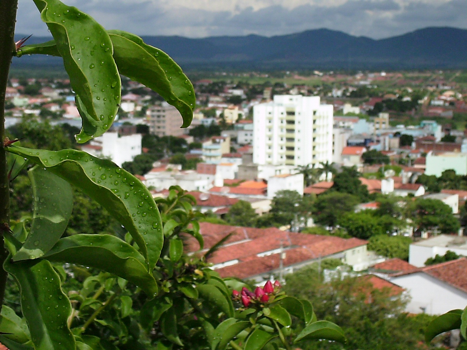 Cidade de Guanambi